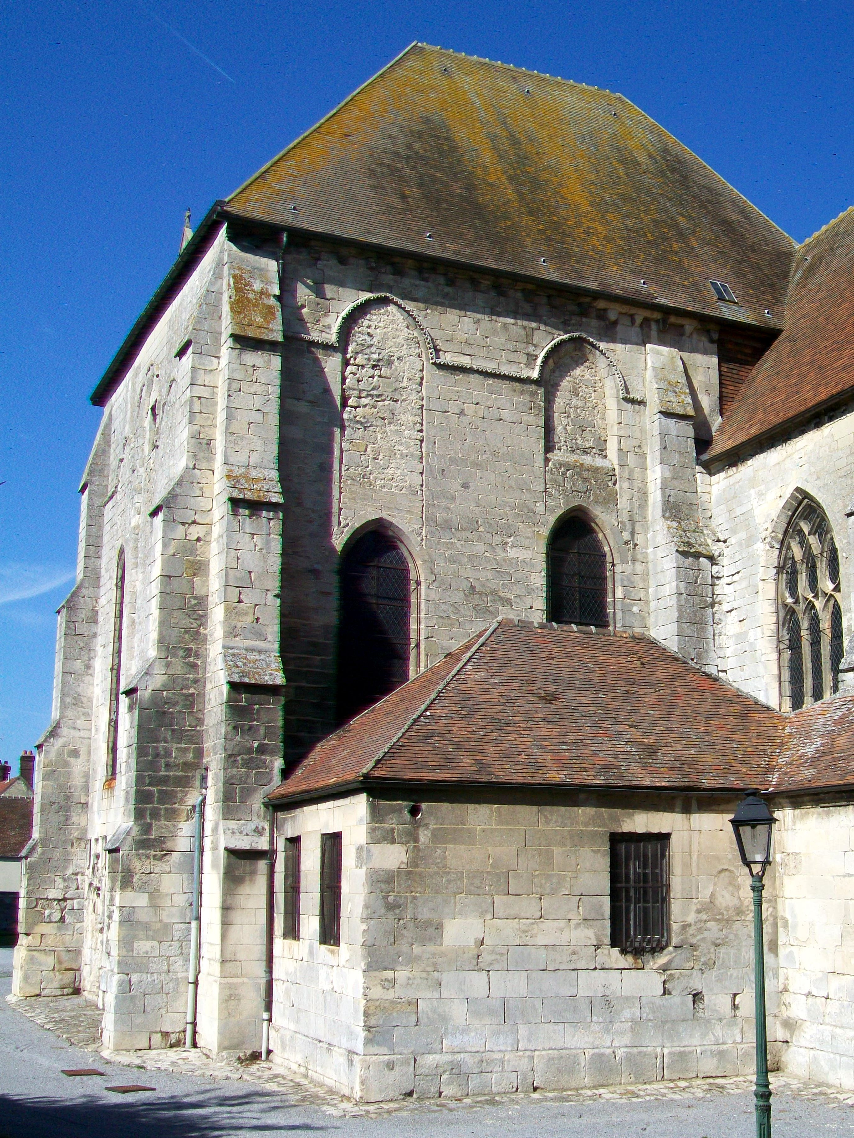 Le transept sud de l'église Saint-Pierre-et-Saint-Paul, qui est la partie la plus ancienne de l'église : il s'agit de l'ancienne chapelle du palais royal dit de Charlemagne.